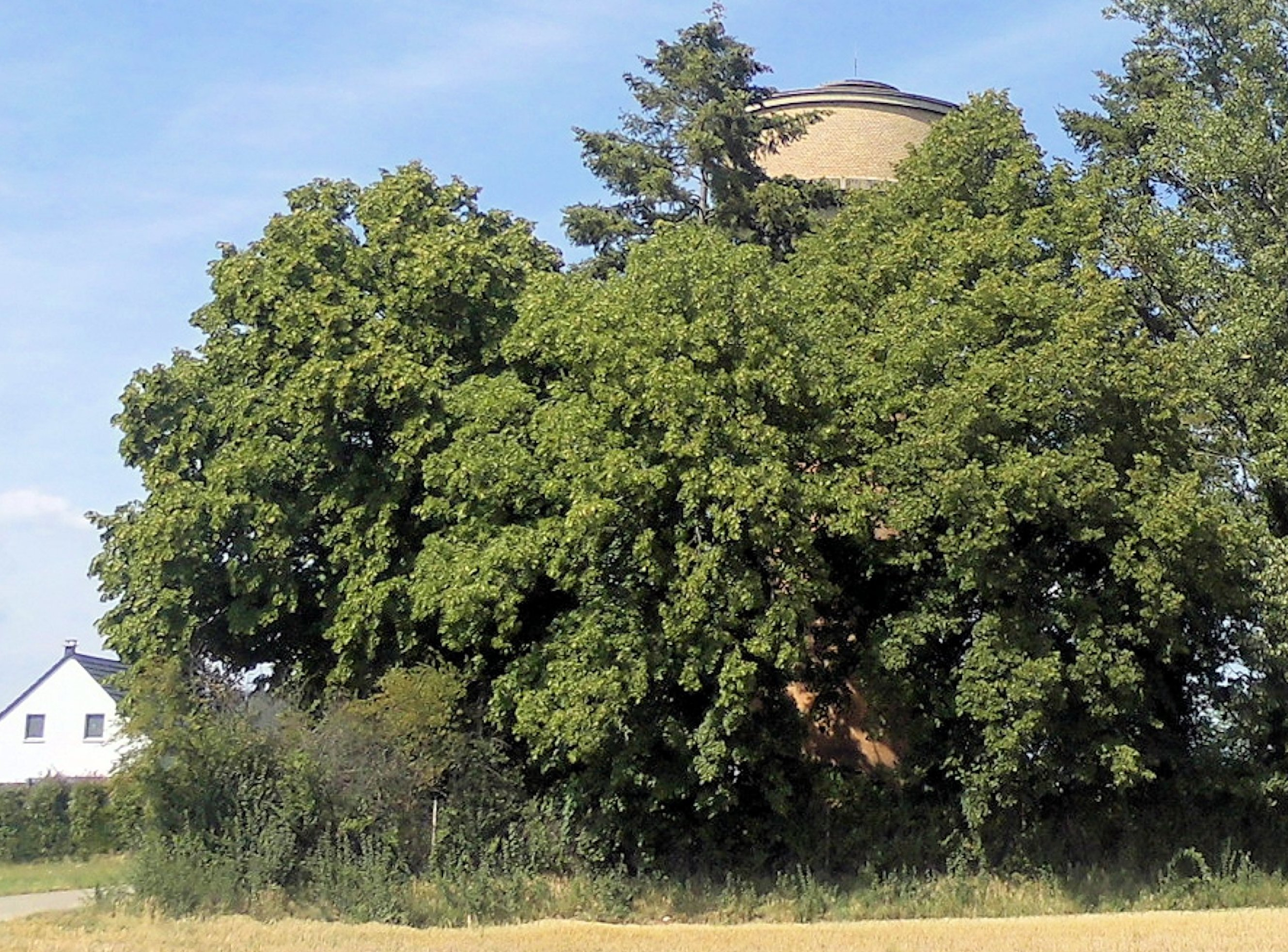 Le châteaz d'eau à Houssen